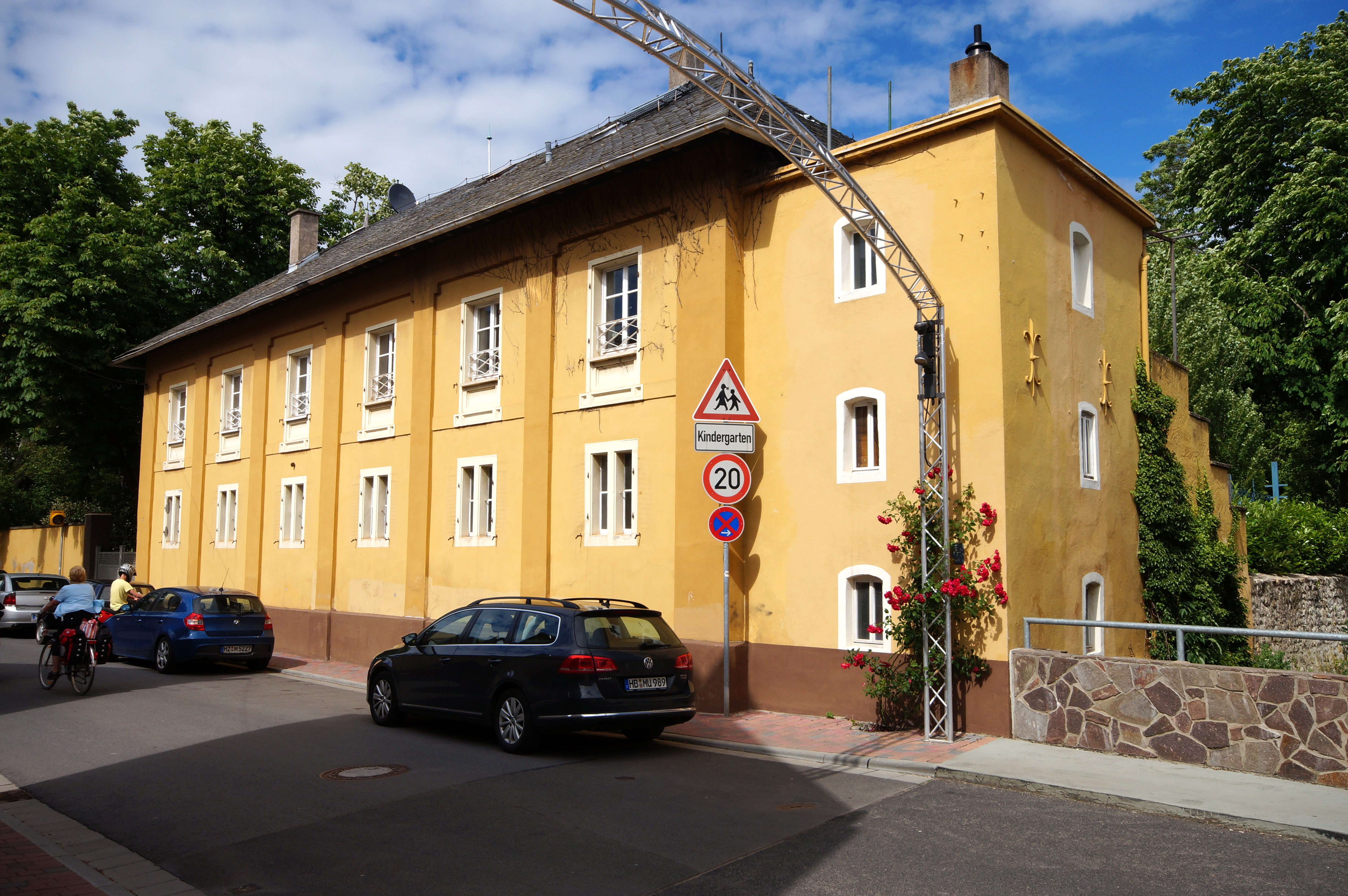 Denkmalgeschütztes Gebäude des Weinguts Freiherr Heyl zu Herrnsheim in der Langgasse 3 in Nierstein